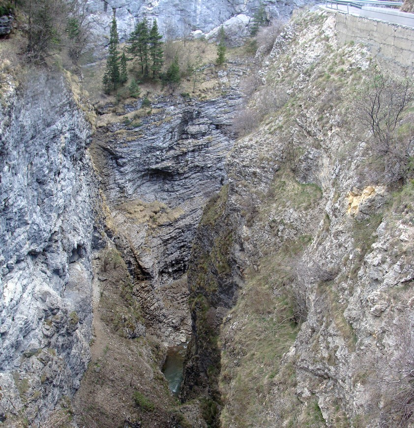 Vue du défilé des Étroits en Dévoluy : en haut à droite la route (D 17), au fond la Souloise ; sur la gauche en bas on distingue un sentier, début de la via ferrata "Vertigo".